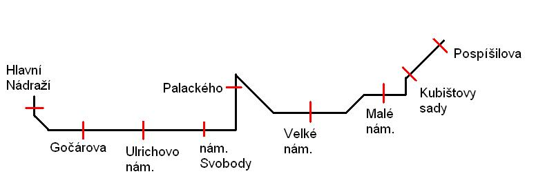 Schéma tramvajové trati v Hradci Králové od nádraží do dnešní Pospíšilovy ulice z doby před 1. světovou válkou (zastávky pouze ilustrační).